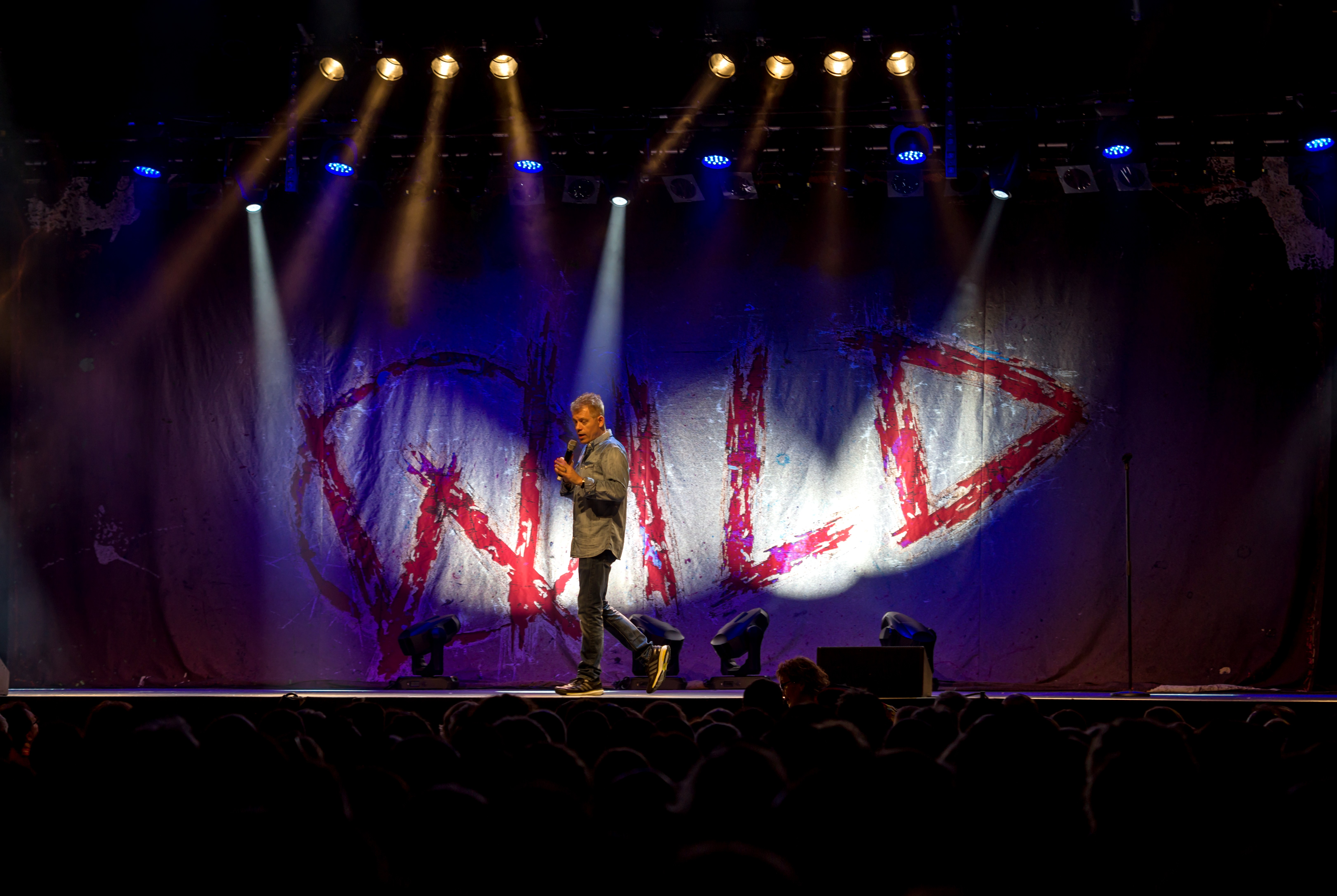 Bilder vom Zelt Musik Festival 2017 in Freiburg im Breisgau Michael Mittermeier "Wild" (ZMF 2017)